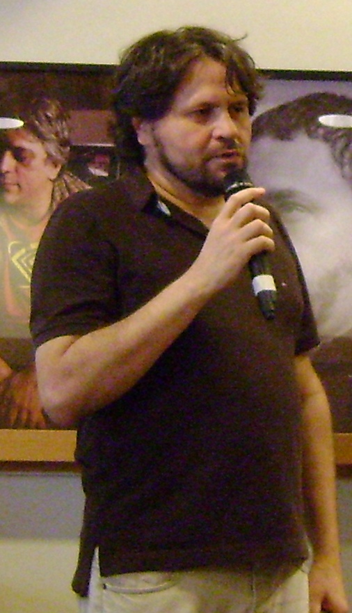 Marcelino Freire, escritor brasileiro, durante a Balada Literária, na Livraria da Vila, em São Paulo.